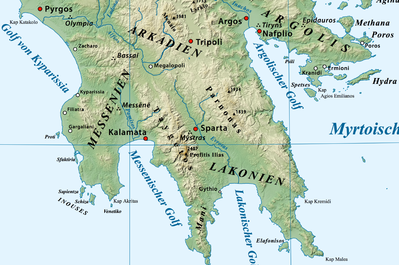 Detailausschnitt Taygetos